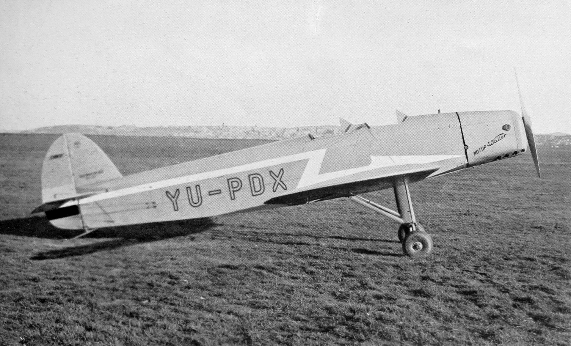 Walter Mikron a Rogažarski SIM VI (1937)